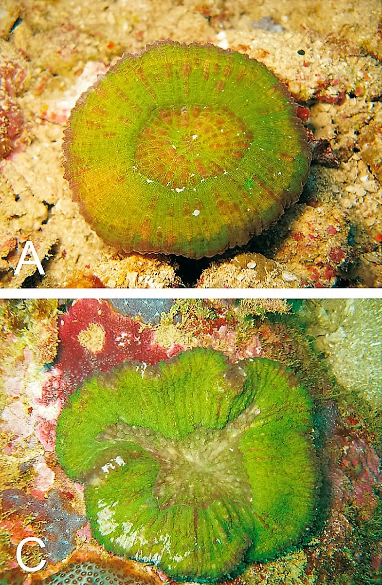 Ejemplares de Parascolymia vitiensis, A: ejemplar de una boca (monostomatous); C: ejemplar de varias bocas (polystomatous). Roberto Arrigoni et al. (2014) Taxonomy and phylogenetic relationships of the coral genera Australomussa and Parascolymia (Scleractinia, Lobophylliidae). Contributions to Zoology, 83 (3)